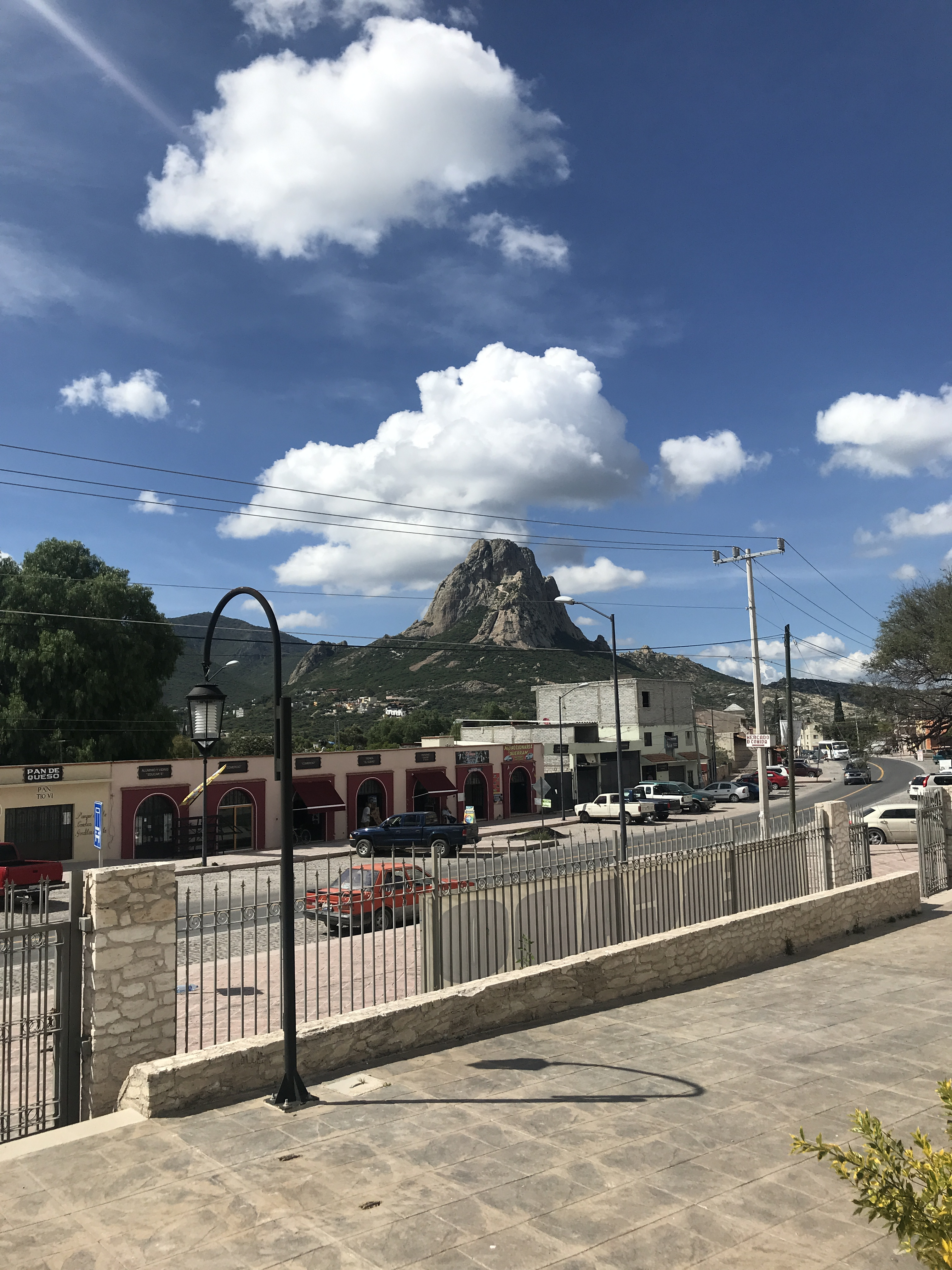 Vista lateral derecha de la Peña de Bernal desde Ezequiel Montes